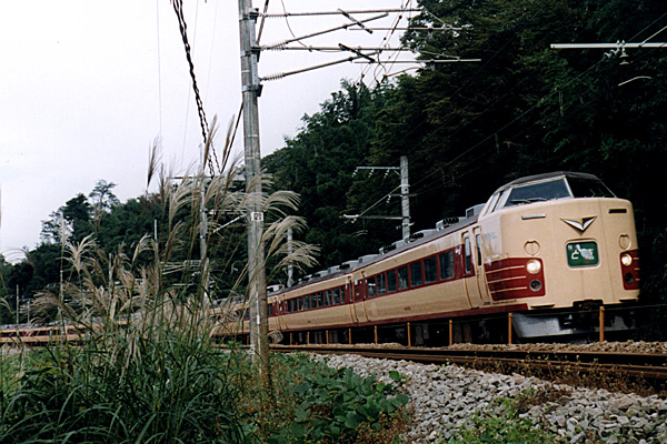 Revival express "Toki"(183 series electric car). 183系によるリバイバル特急｢とき｣。